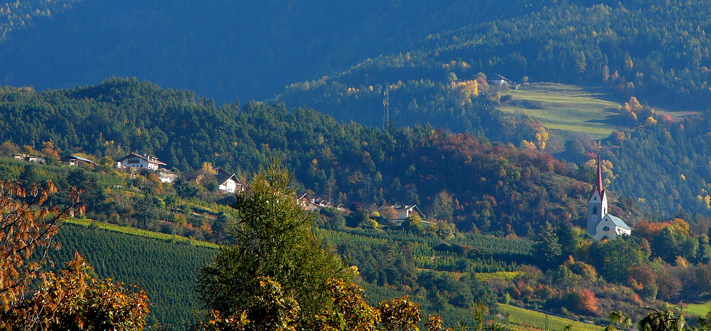 Kirche St. Margareth zu Schabs vom Rastplatz der Brennerautobahn aus gesehen.